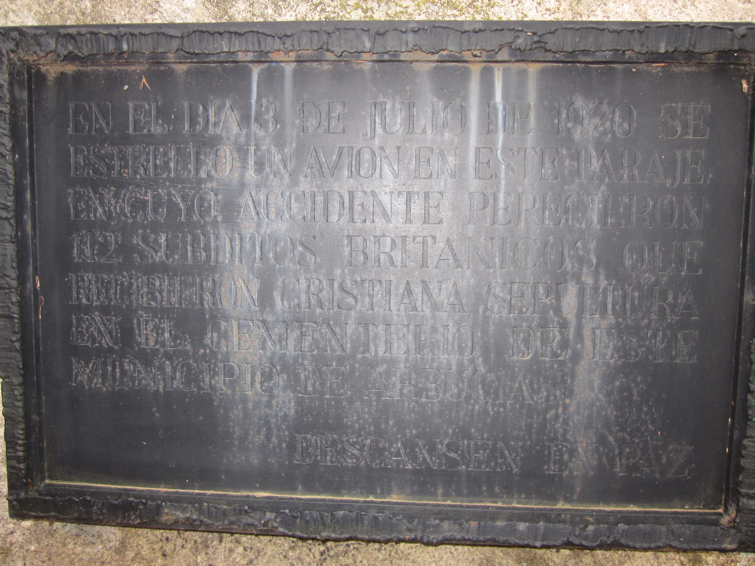 Placa